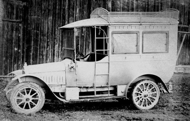 Martini Camionette ca. 1907